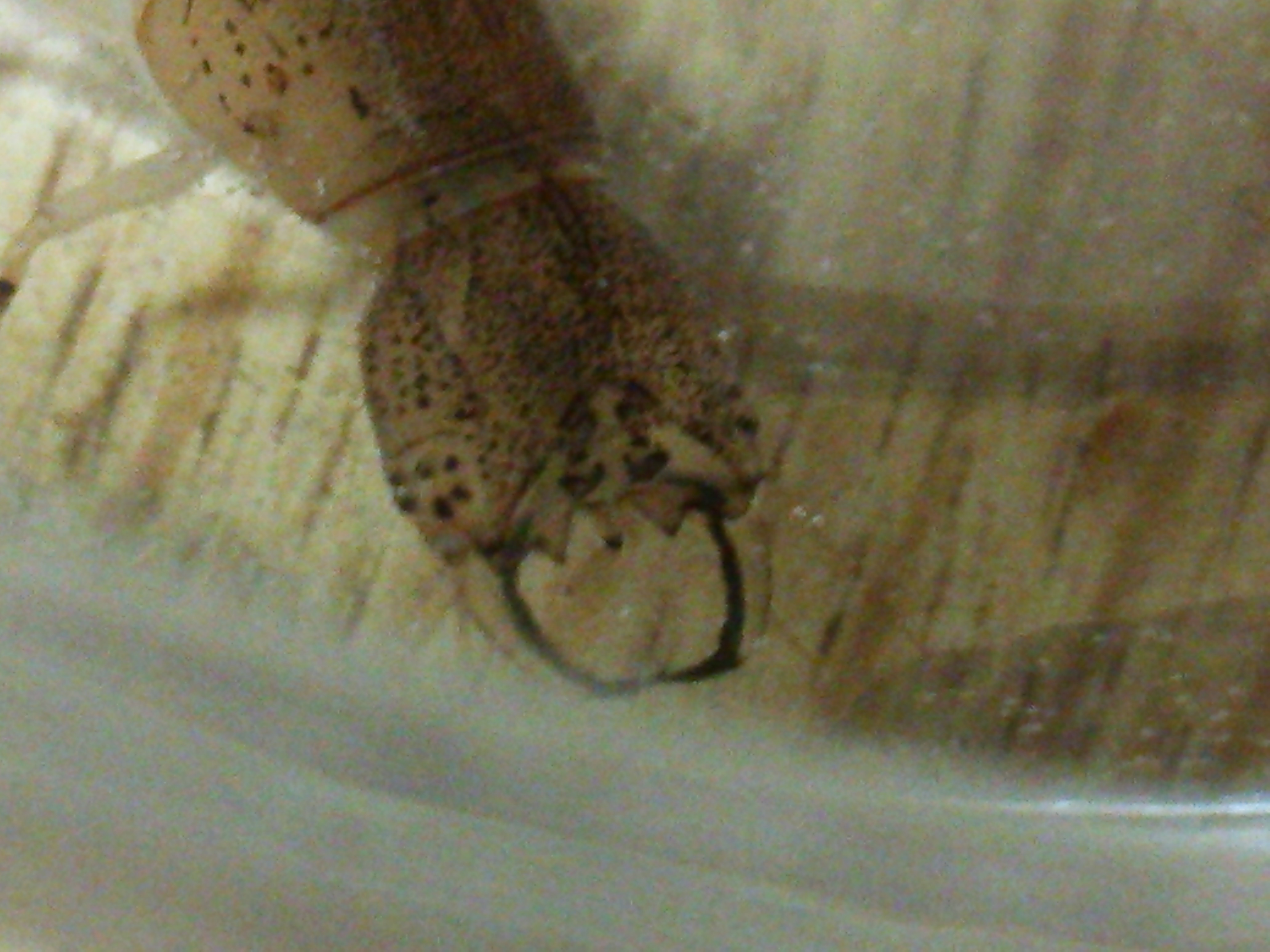 飼育下でのゲンゴロウ終齢幼虫の頭部拡大